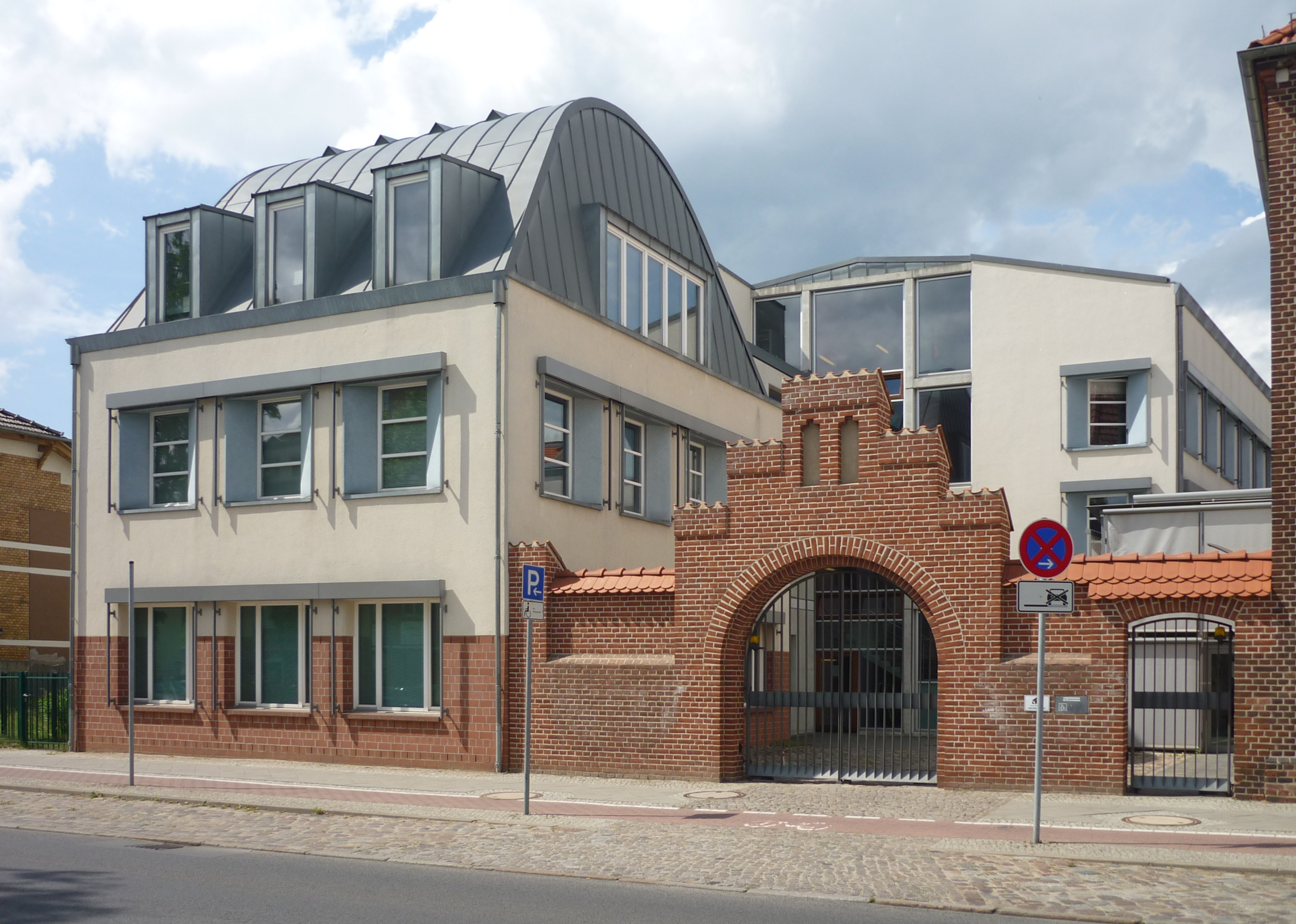 Im Jahre 2003 fertiggestellter Ergänzungsbau des Amtsgerichtes in Bernau bei Berlin, Breitscheidstr. 50